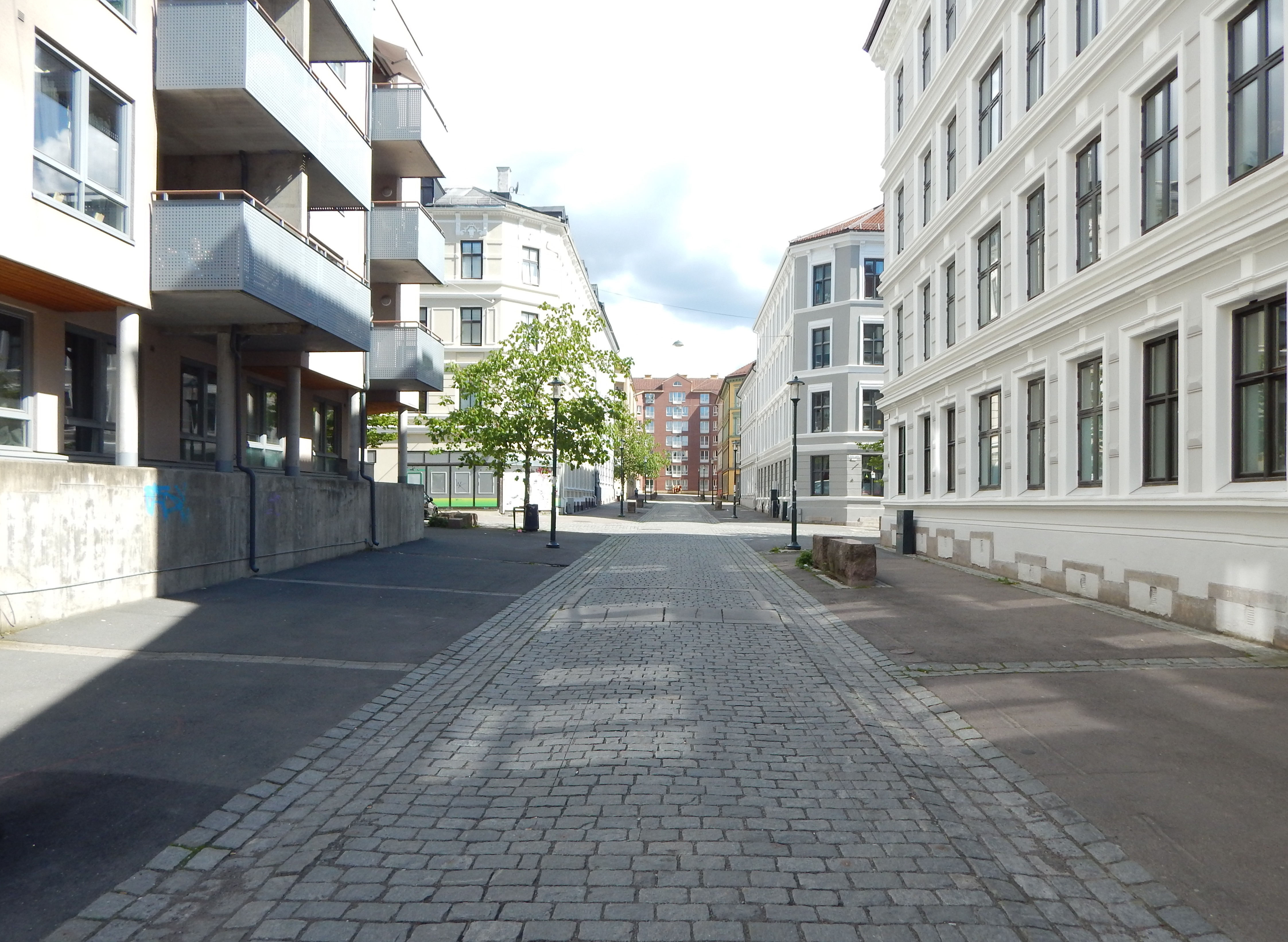 Gunhilds gate sørøstover mot Eiriks gate